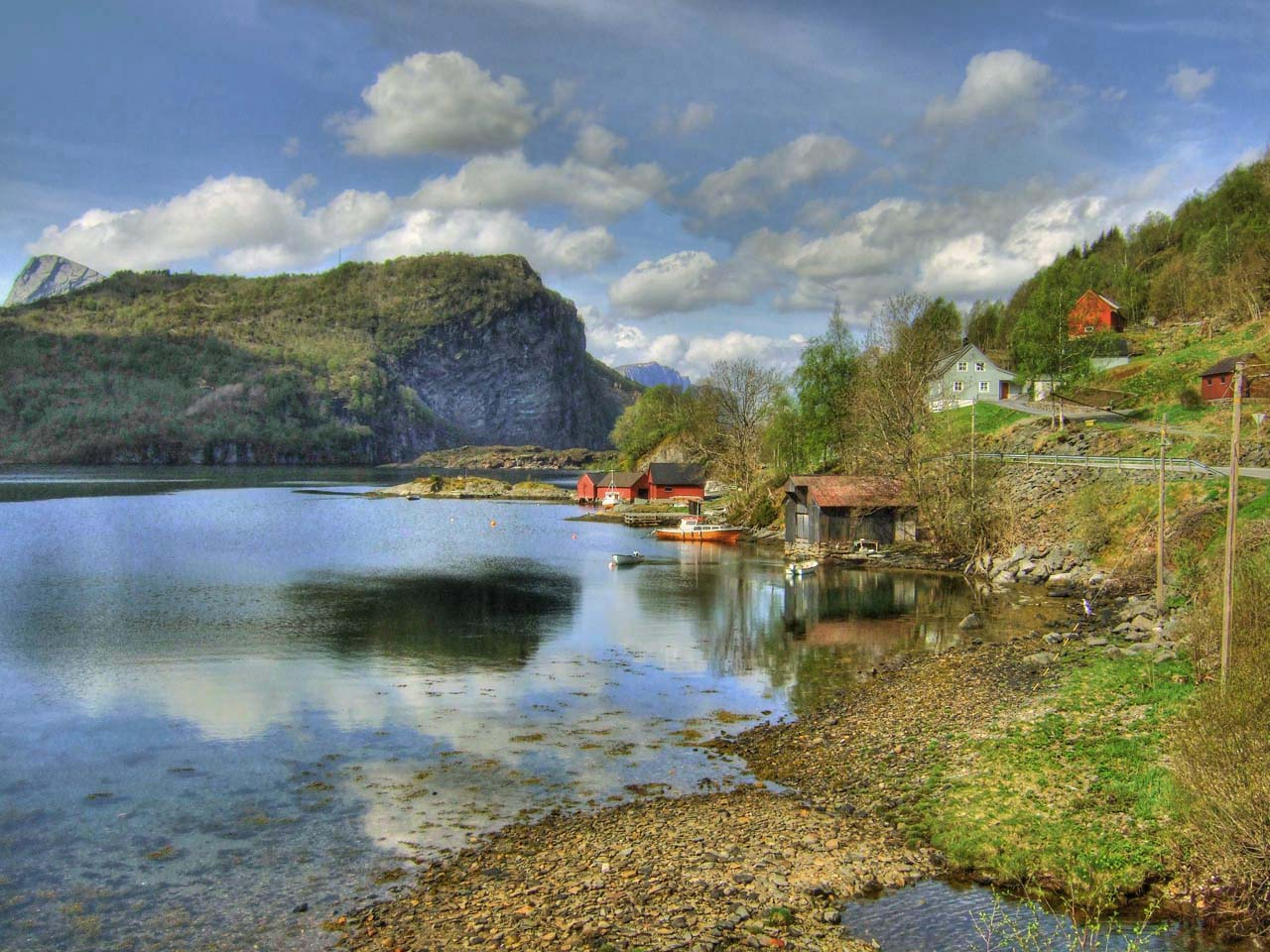 Sørefjorden, Rønset, Katlenova i Hyllestad